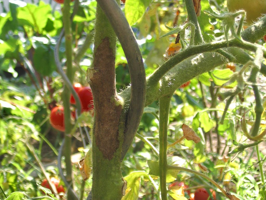 Tomaten staengel